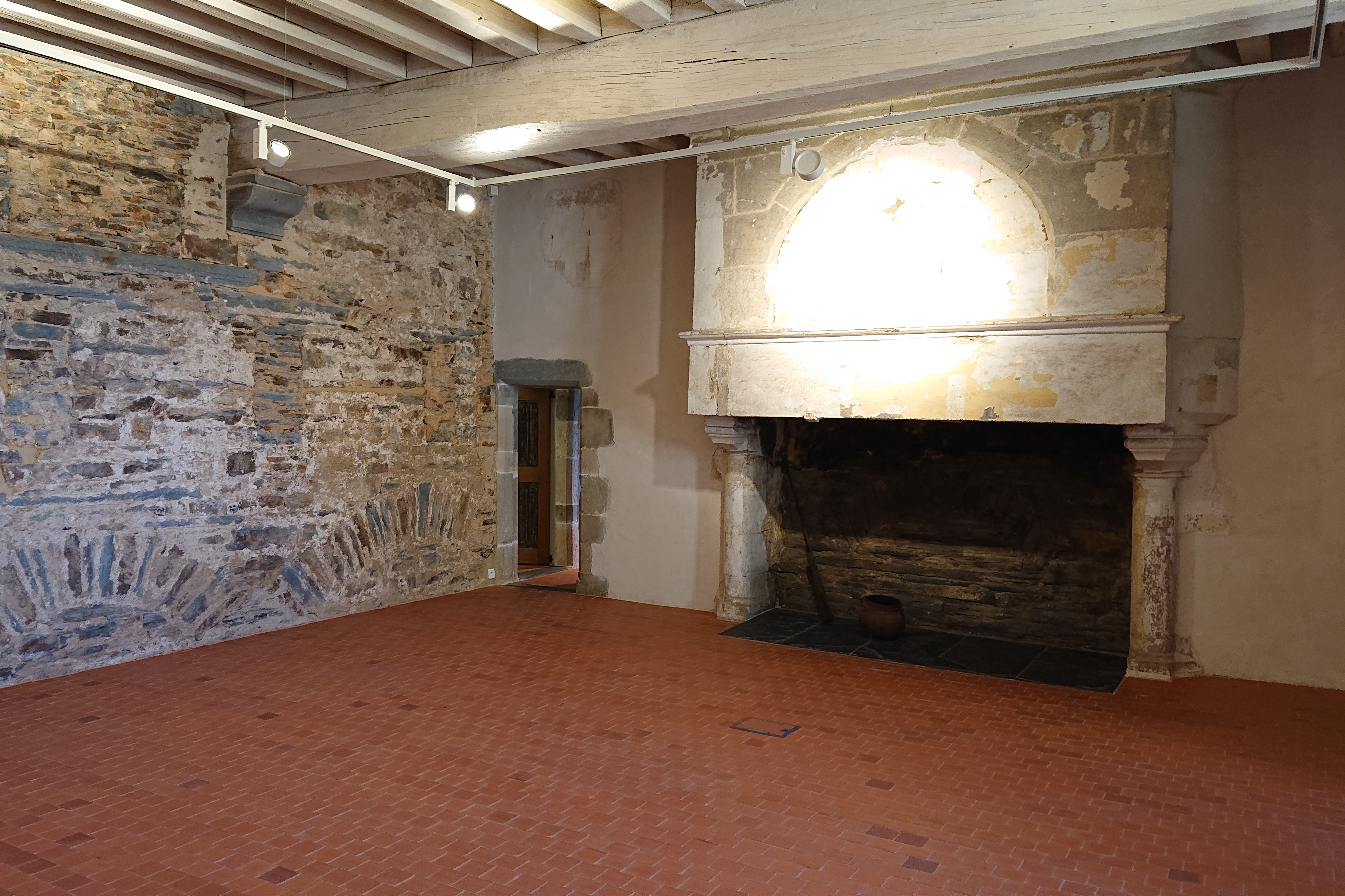 Grande salle du premier étage du Grand Logis, Château de Châteaubriant, France.